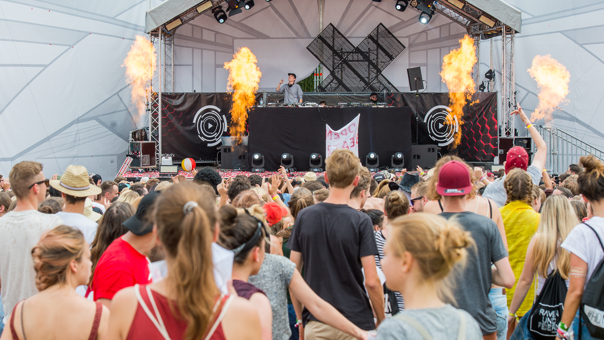 Festival,Konzert,Livekonzert,Livemusik,Lost Frequencies,Mainstage,Musik,Open Beatz 2016